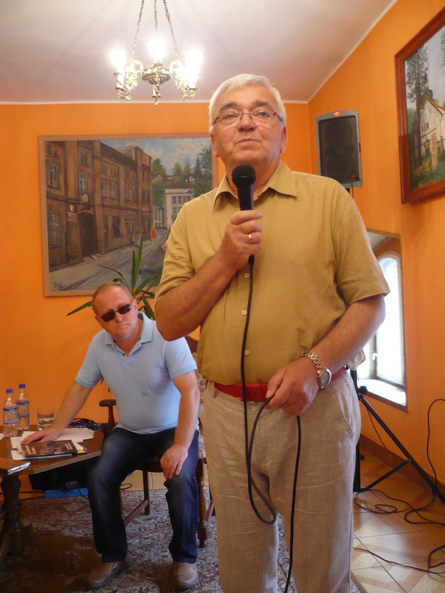 XXVI Noworudzkie Spotkania z Poezją